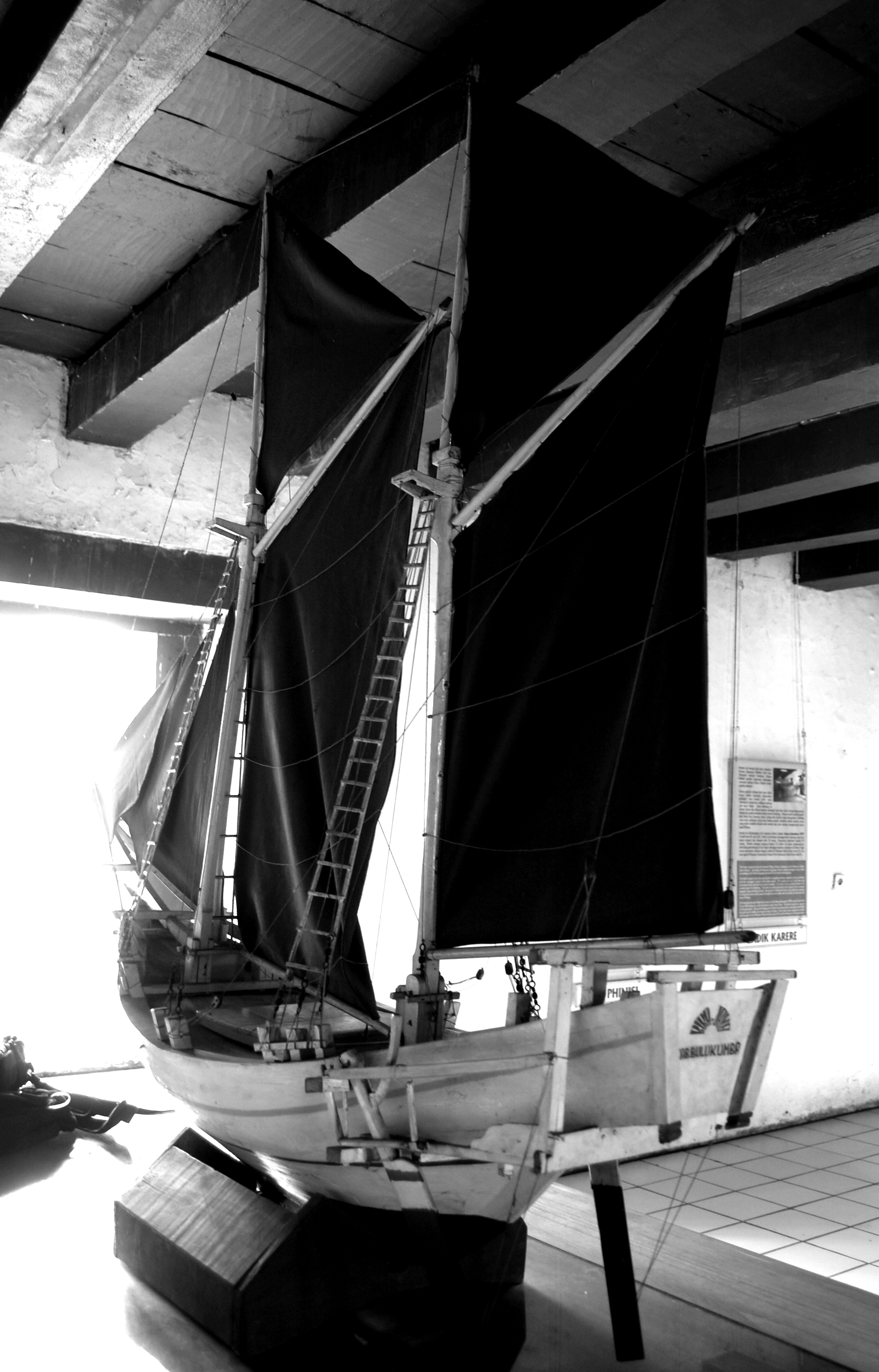 Replika Kapal Pinisi di Museum Bahari